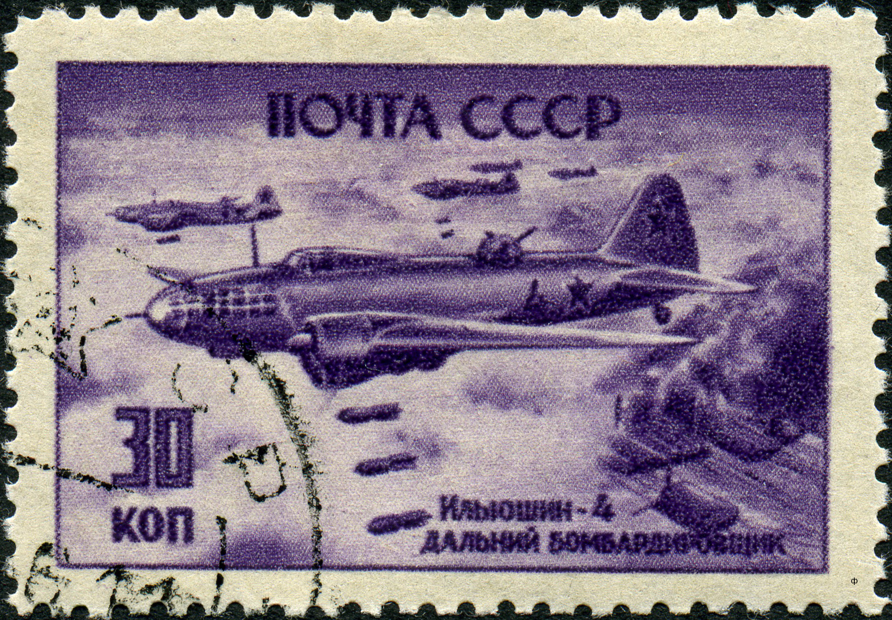 Марка СССР